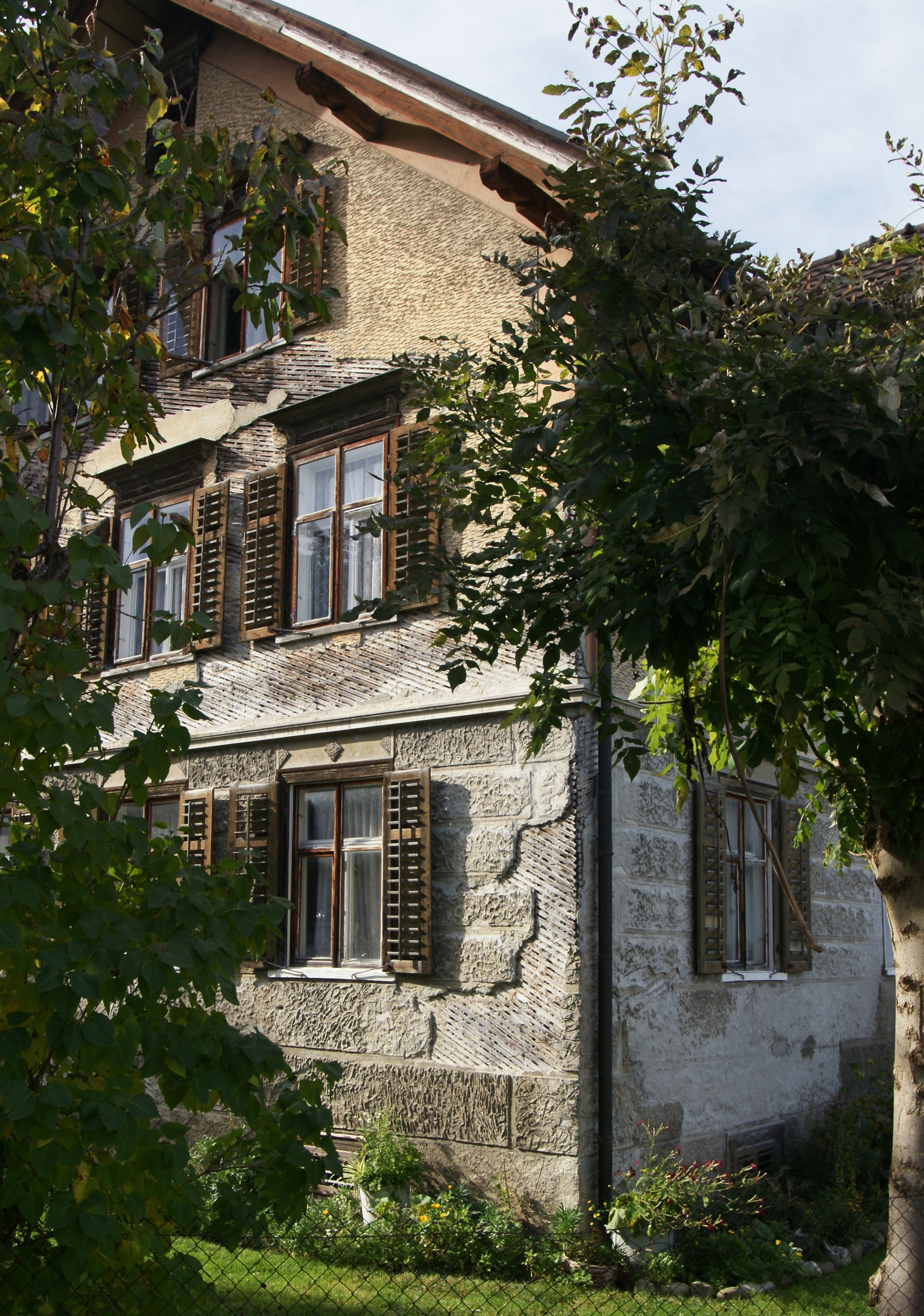 Freigelegter Putz (Baustoff)-Putzträger aus diagonal verlegten, trapezförmigen Holzstäben. aus dem DEHIO Vorarlberg 1983: Hatlerdorf, Leopoldstraße Nr.3+5 Bauernhäuser Ende 19.Jh. Wohntrakt mit Zwerchgiebel in der Art vorstädtischer Wohnhäuser, Obergeschoss geschindelt, historistische Details.